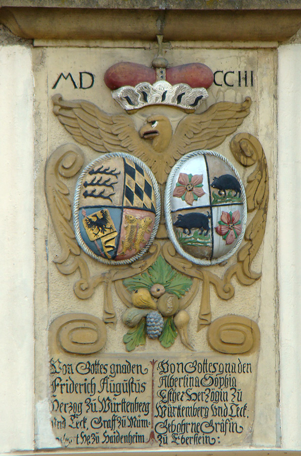 Allianzwappen von Friedrich August von Württemberg-Neuenstadt und Albertina Sophia Esther von Eberstein, datiert 1703, am Oberen Turm in Neuenstadt am Kocher